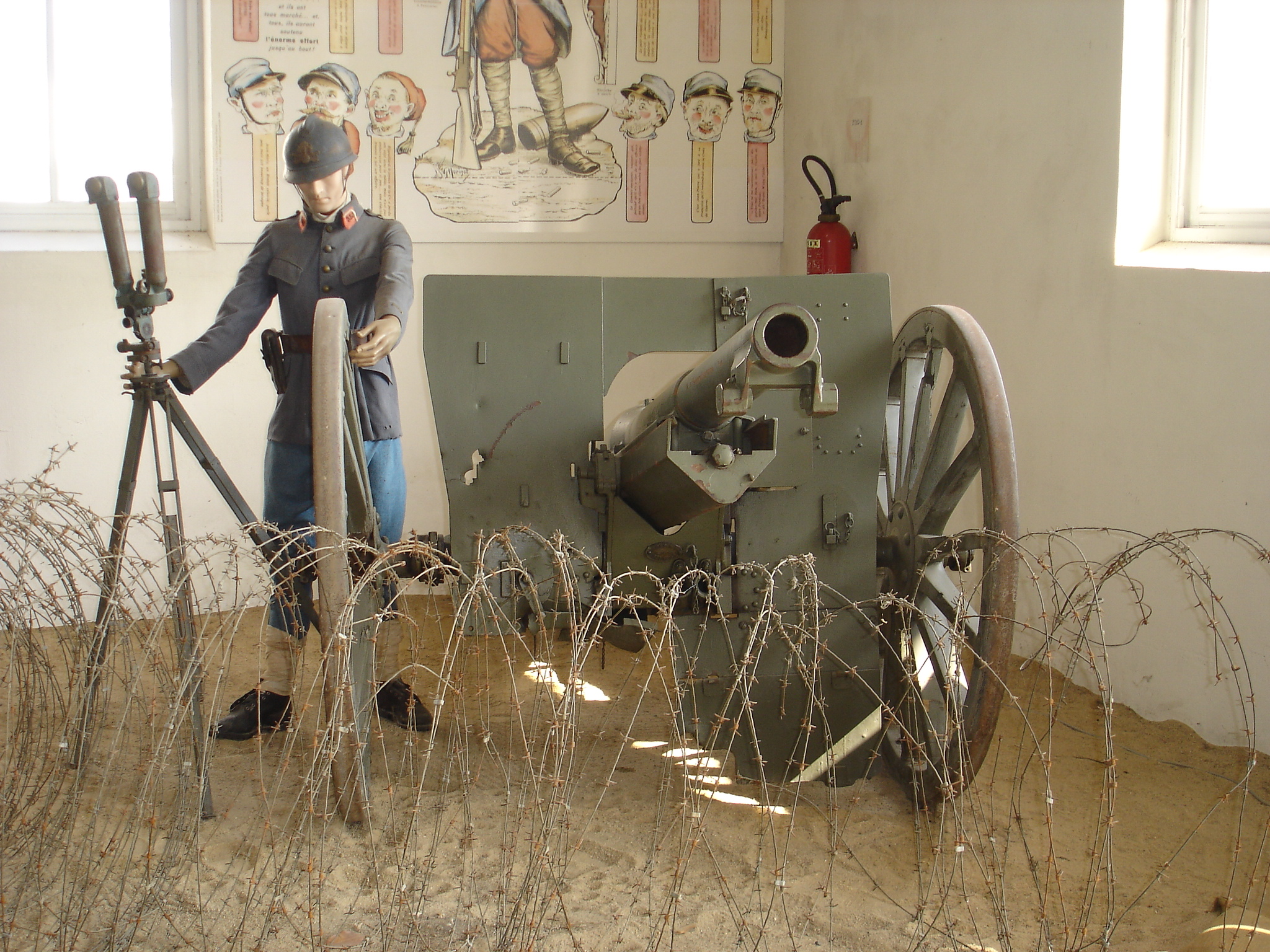 Combattant de la Grande Guerre et canon de 75 (mle 1897) - Musée des blindés de Saumur